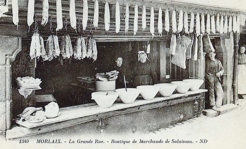 Ouvroir du 8, Grand Rue à Morlaix (étal en pierre ouvert sur la rue ; rare exemple de boutique de type médiéval existant encore au début du XXe siècle : le marchand est à l'intérieur et les clients à l'extérieur). Cette maison a été construite vers 1530.